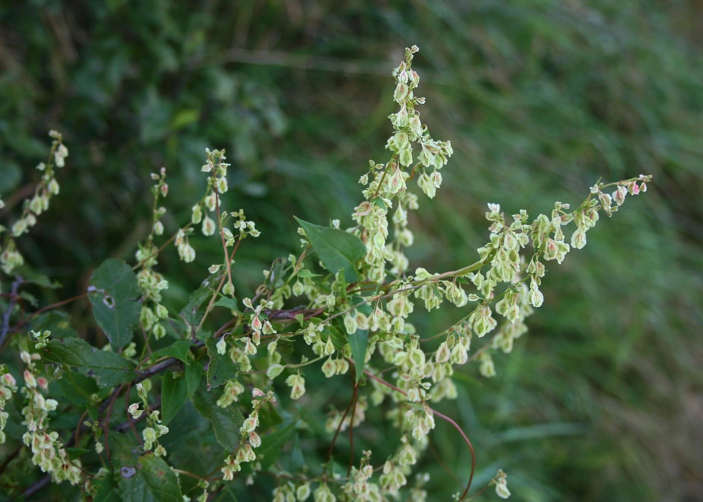 Hecken-Flügelknöterich (Fallopia dumetorum), Knöterichgewächse (Polygonaceae) - Österreich/Austria/Autriche: Niederösterreich, Alpenostrand, ca. 1.5 km SW Gumpoldskirchen